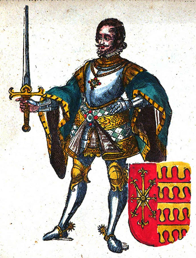 Diederik VI